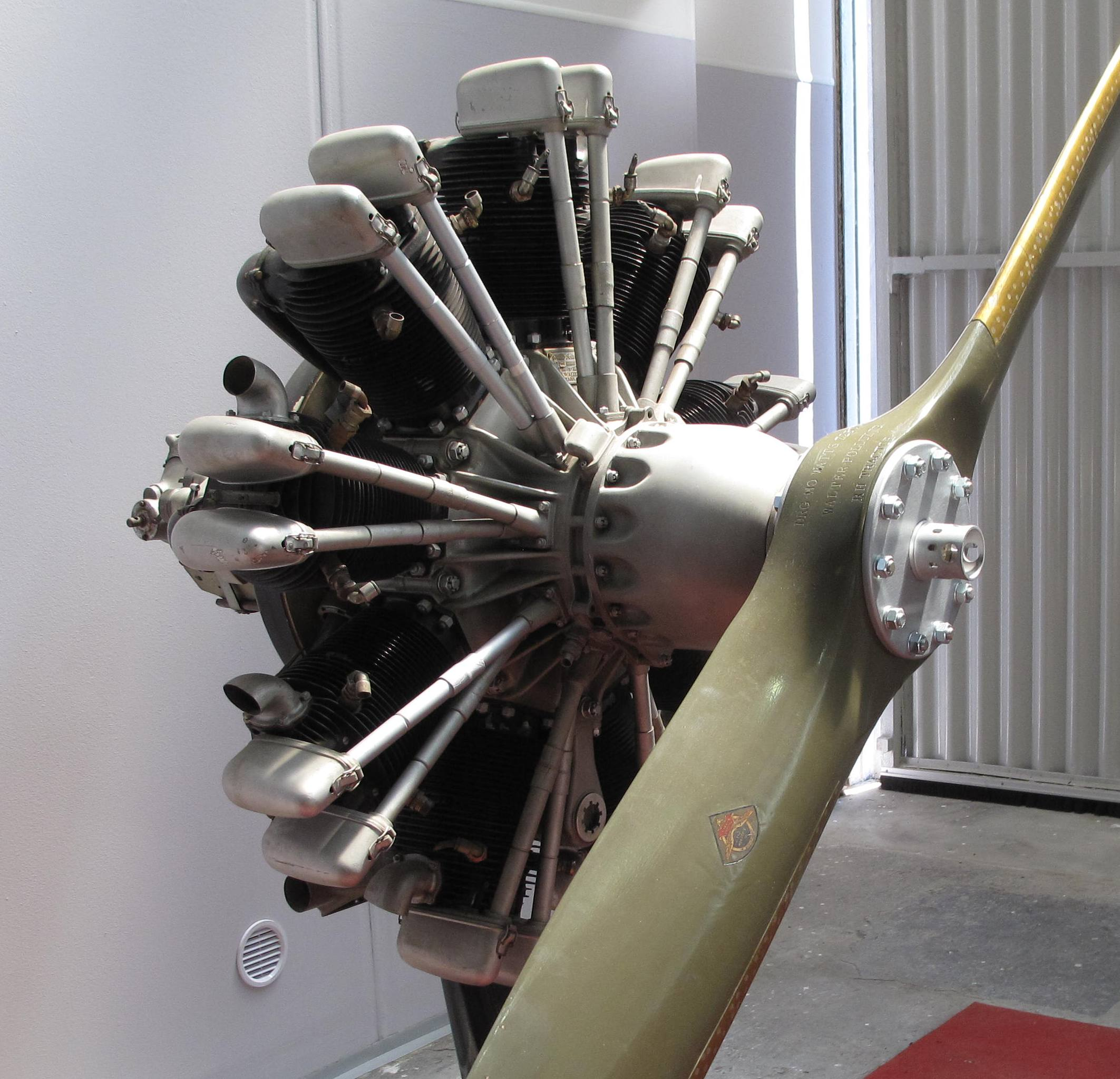 Letecké muzeum Kbely